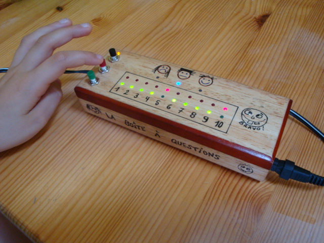 Jeu pédagogique électronique (à fabriquer soi-même ou à faire faire) dont le but est de marier motivation et renforcement. Un adulte (prof, parent, animateur) pose une série de questions à un enfant (épeler un mot, calcul de tables de multiplications, traduire un mot dans une autre langue, etc.). A chaque bonne réponse, l'enfant appuie sur le bouton vert et allume la diode correspondant au numéro de la question à laquelle il répond. S'il se trompe, il appuie sur le bouton rouge. Au terme des dix questions, la programmation électronique allume la lampe sous le smiley correspondant au résultat. Un bouton redémarre le jeu à zéro. Ce jeu remporte un très grand succès chez les enfants en difficulté (remédiation). Il peut être sympa à posséder dans un cabinet de logopède, dans une classe ou à la maison. Vous pouvez de plus le dessiner à votre goût; les étudiants en électronique peuvent vous être d'un grand secours !